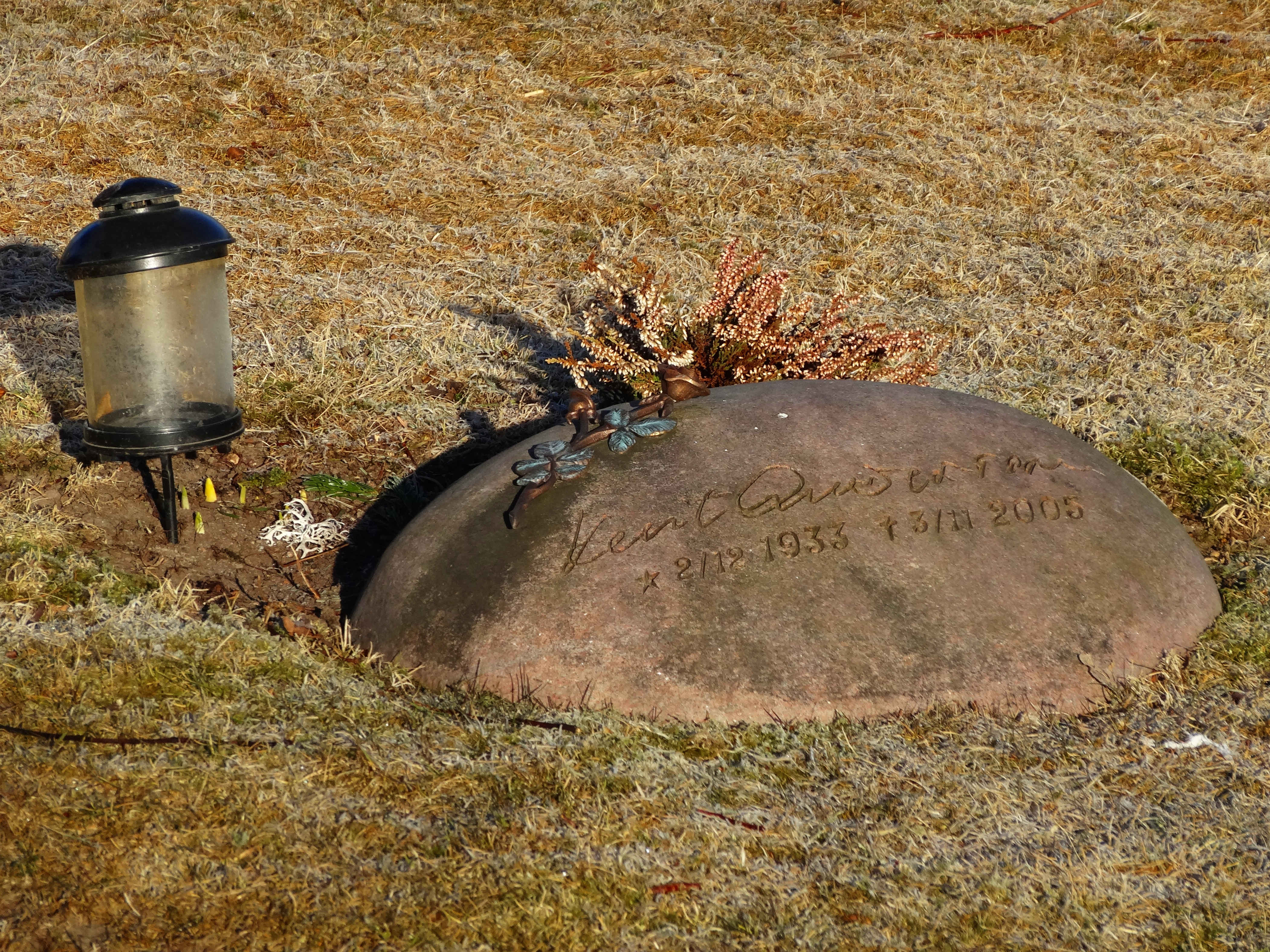 Gravvård över skådespelaren Kent Andersson (1933-2005) på Lundby nya kyrkogård i Göteborg.